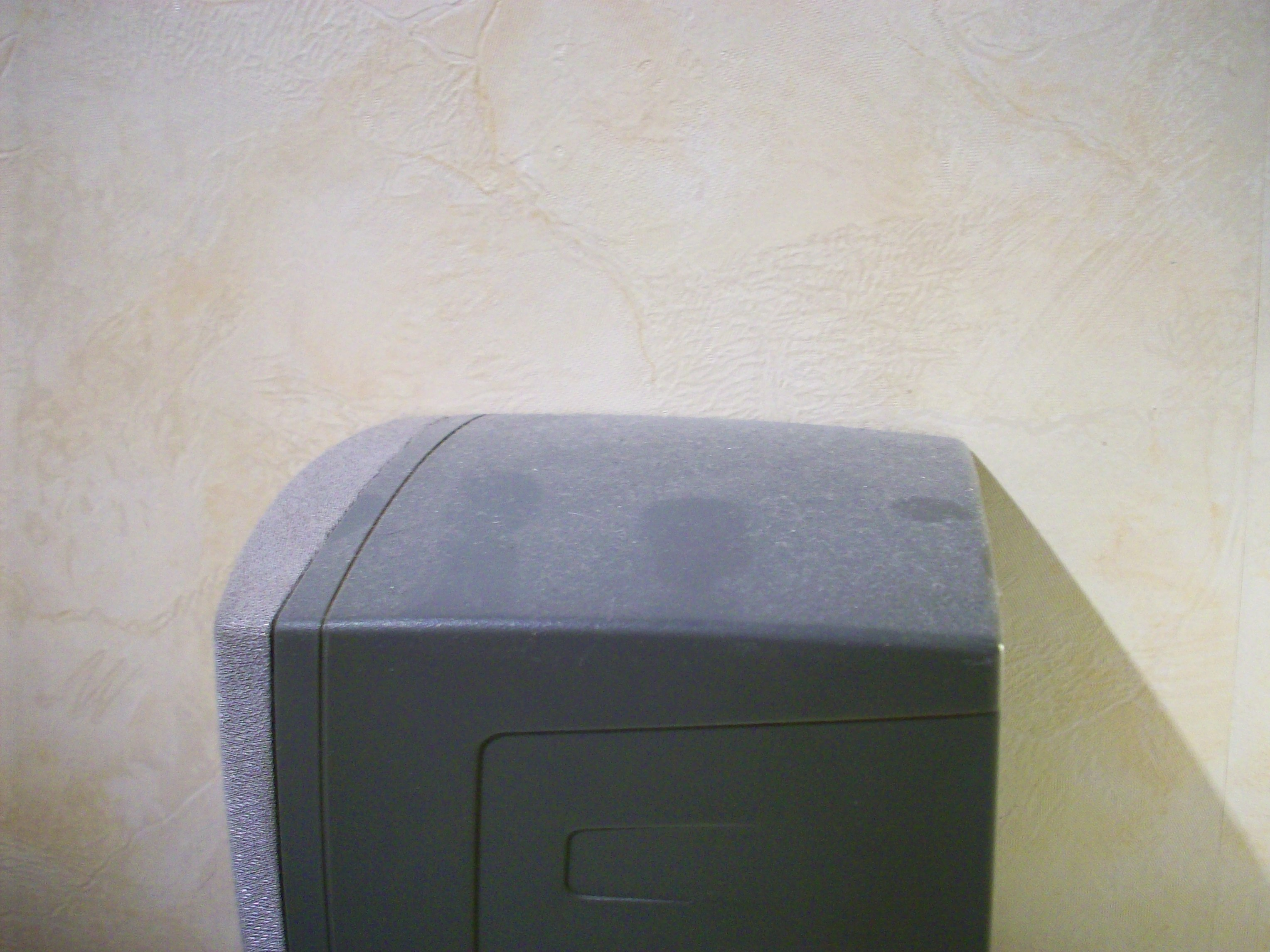 Hausstaub auf einem Lautsprecher.